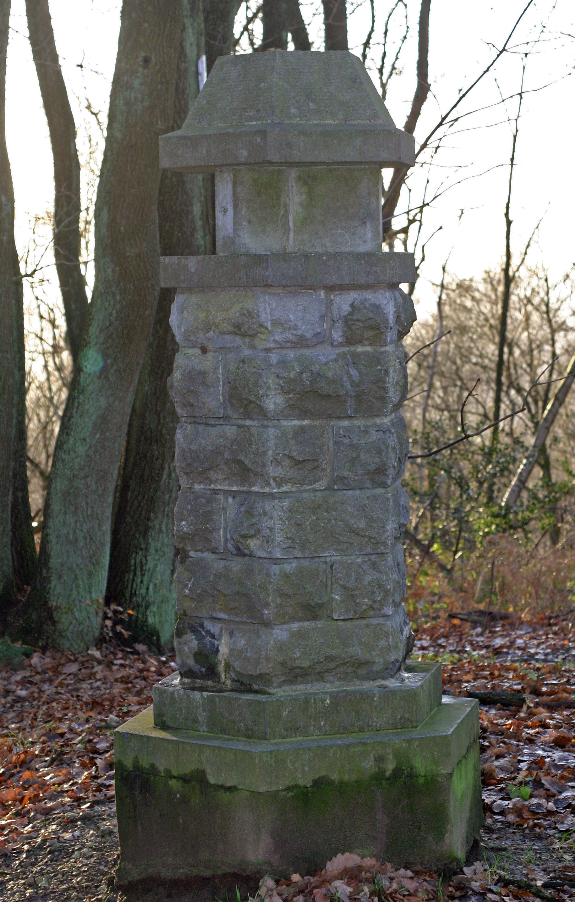 Dräilännereck B-D-NL